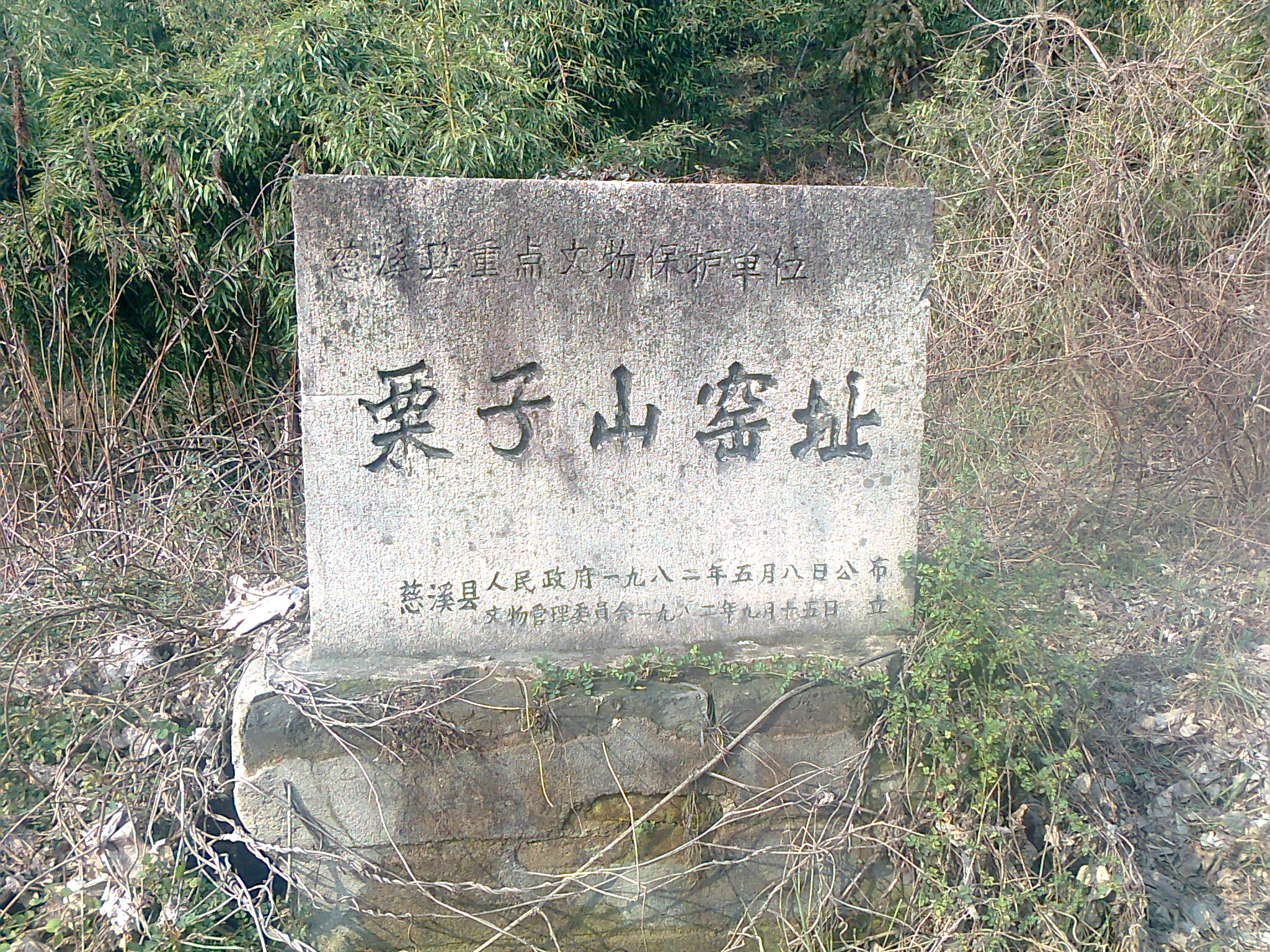 中文（中国大陆）: 里杜湖栗子山越窑遗址（碑)